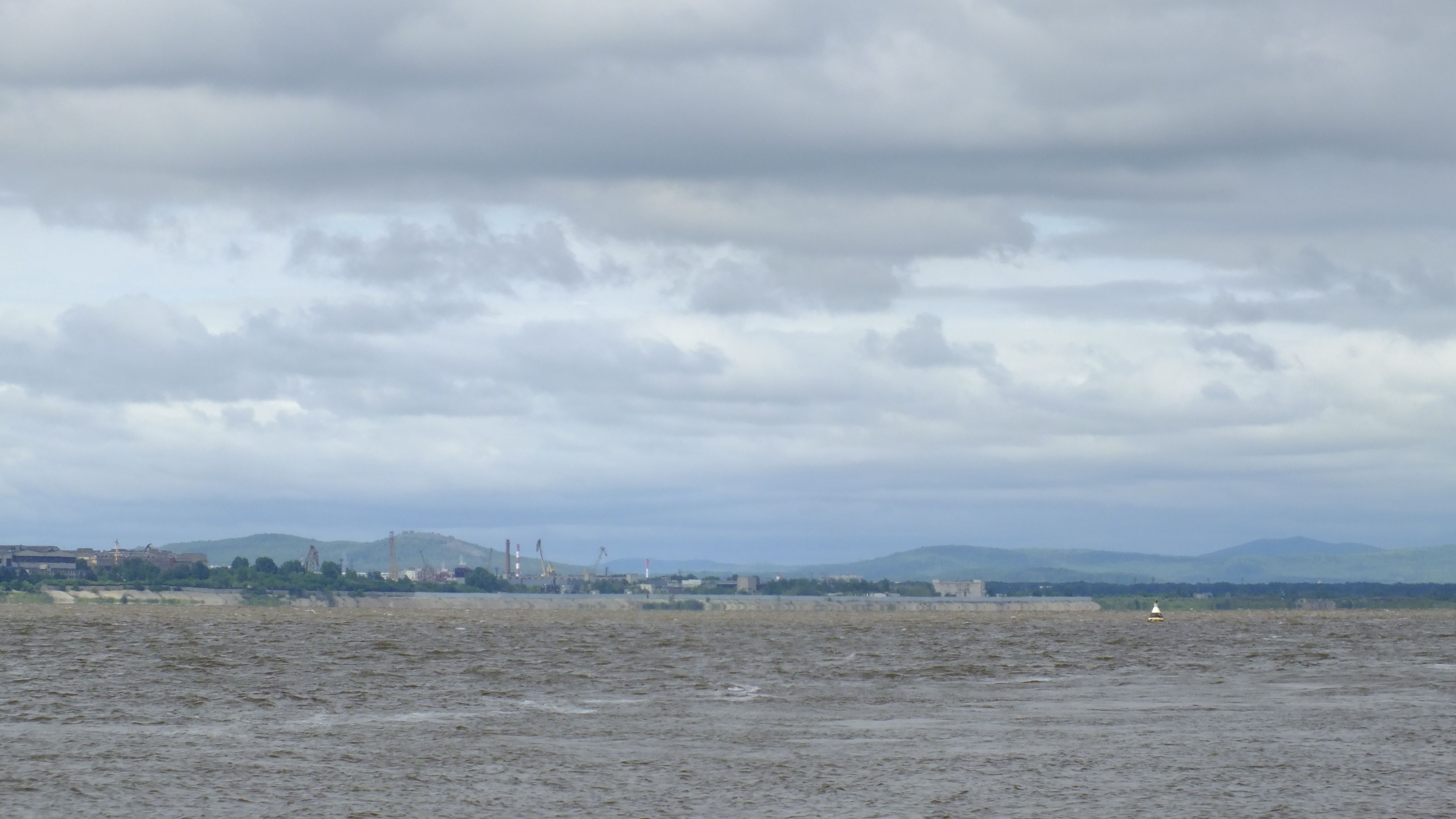 Амурский судостроительный завод Комсомольск-на-Амуре